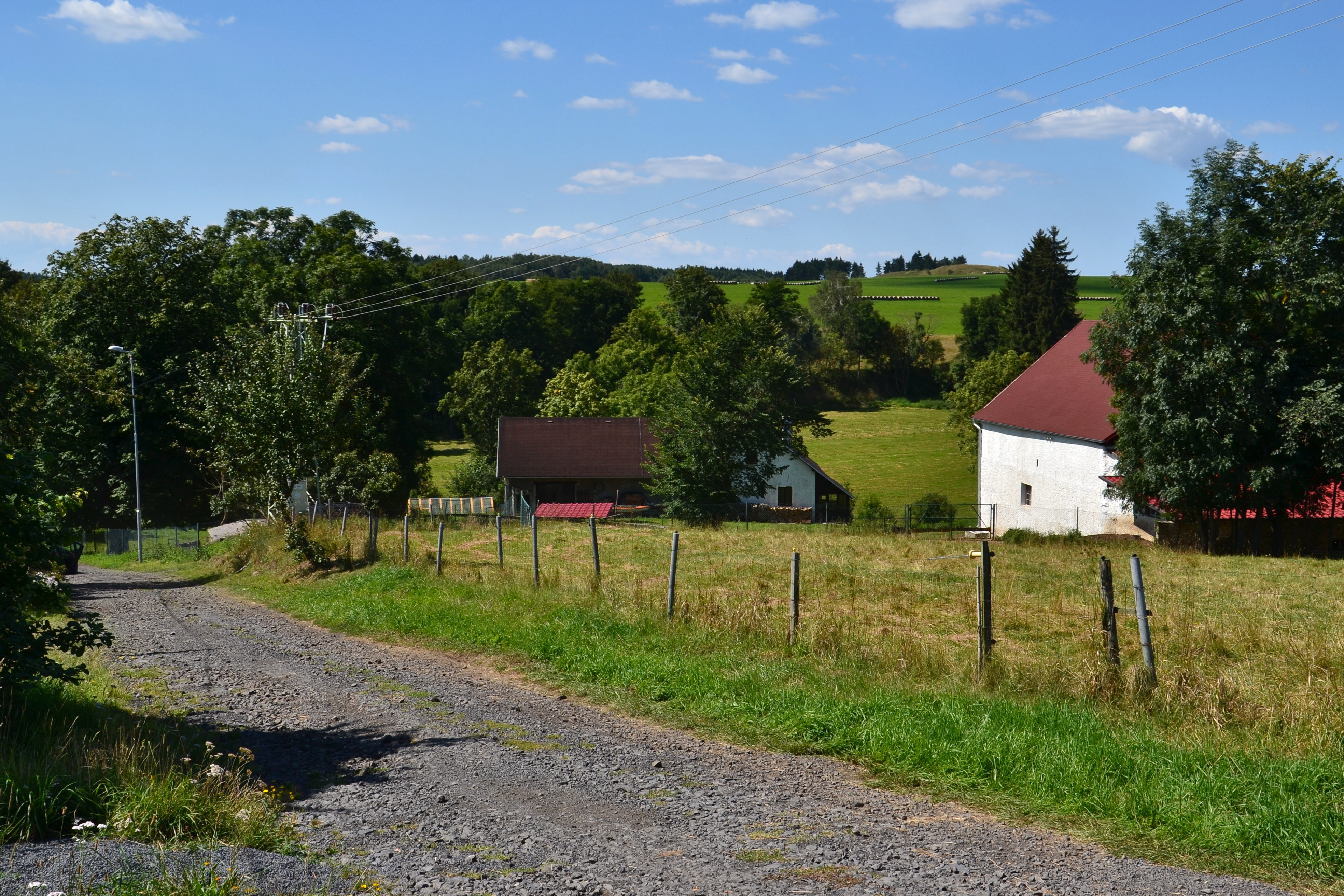 Vjezd do osady